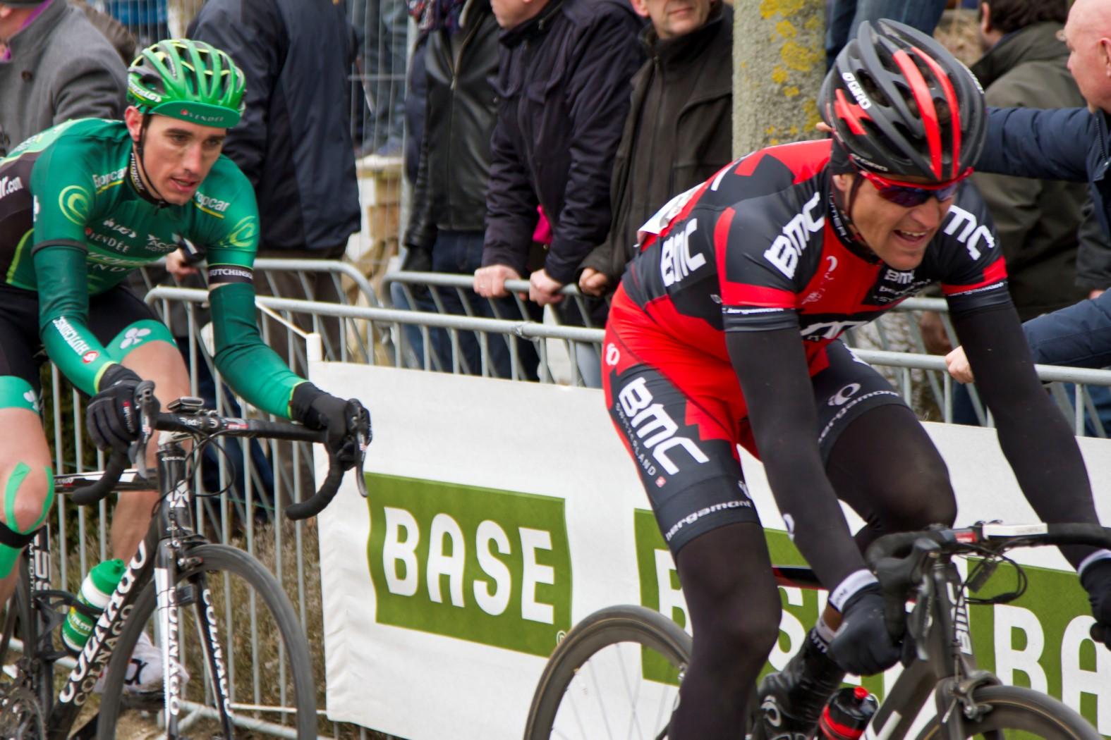 275 turgot en van avermaet